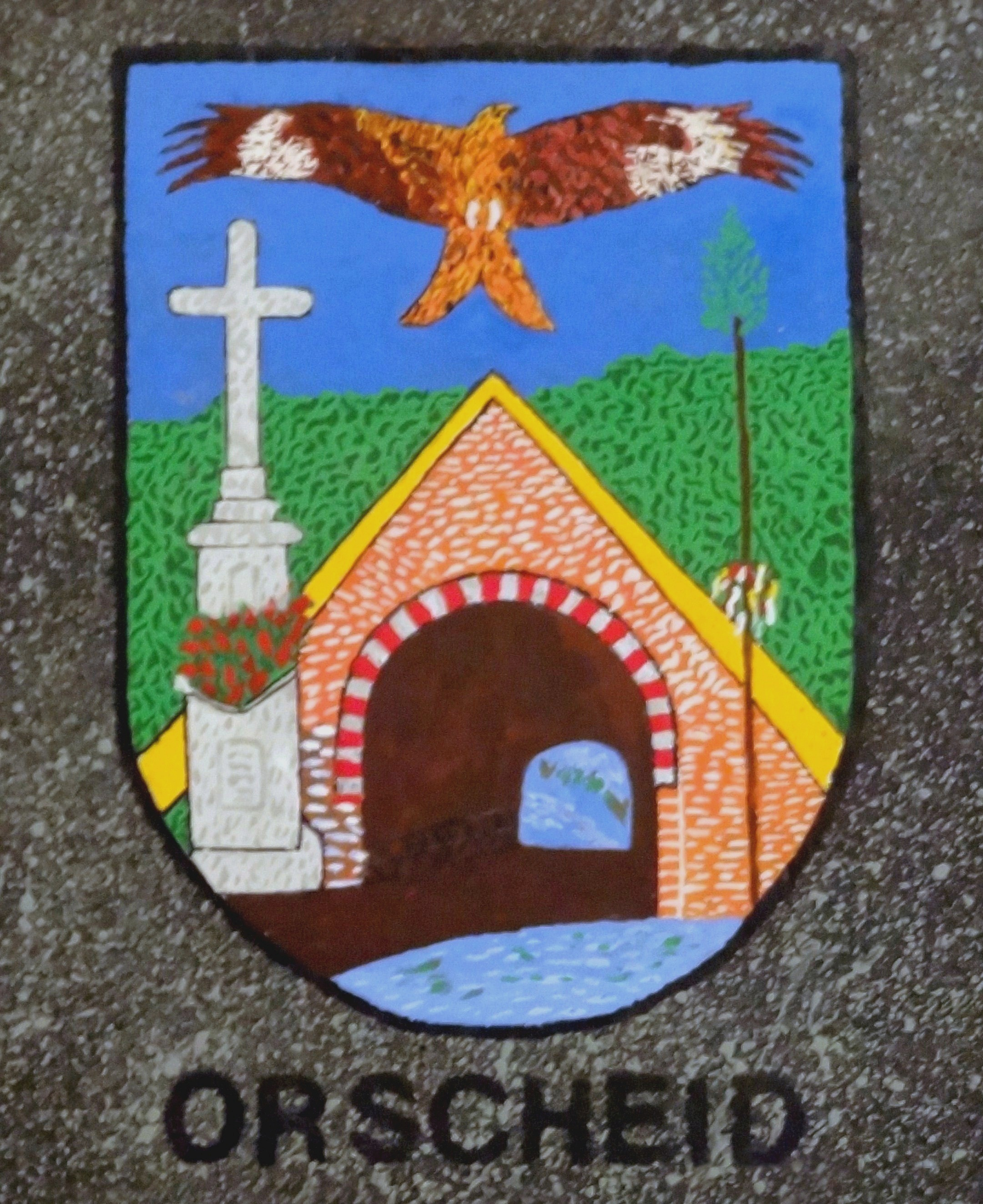 Schiefertafel als Ortswappen von Orscheid, erstellt von Richard Lenzgen